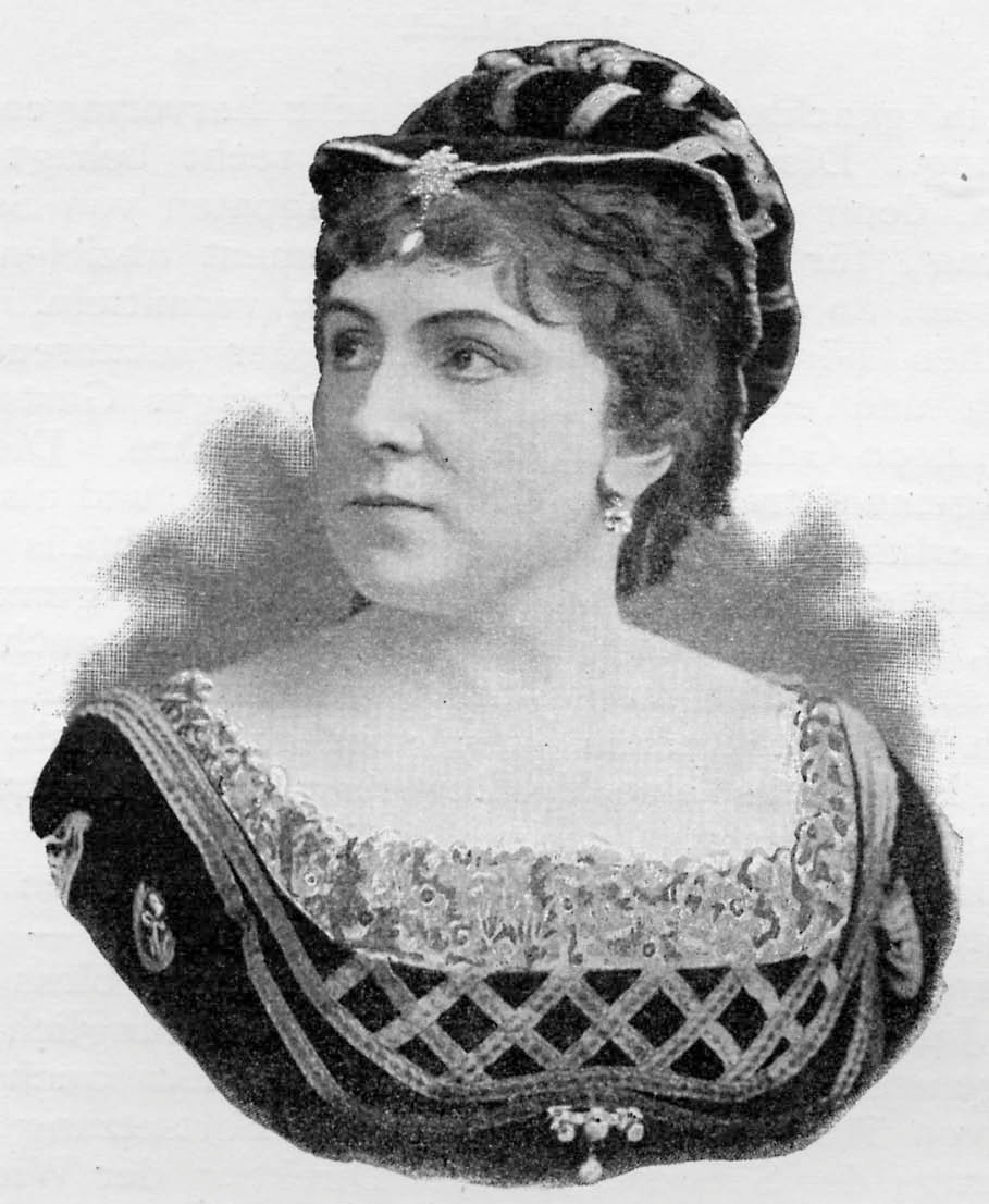 Marie Rôze